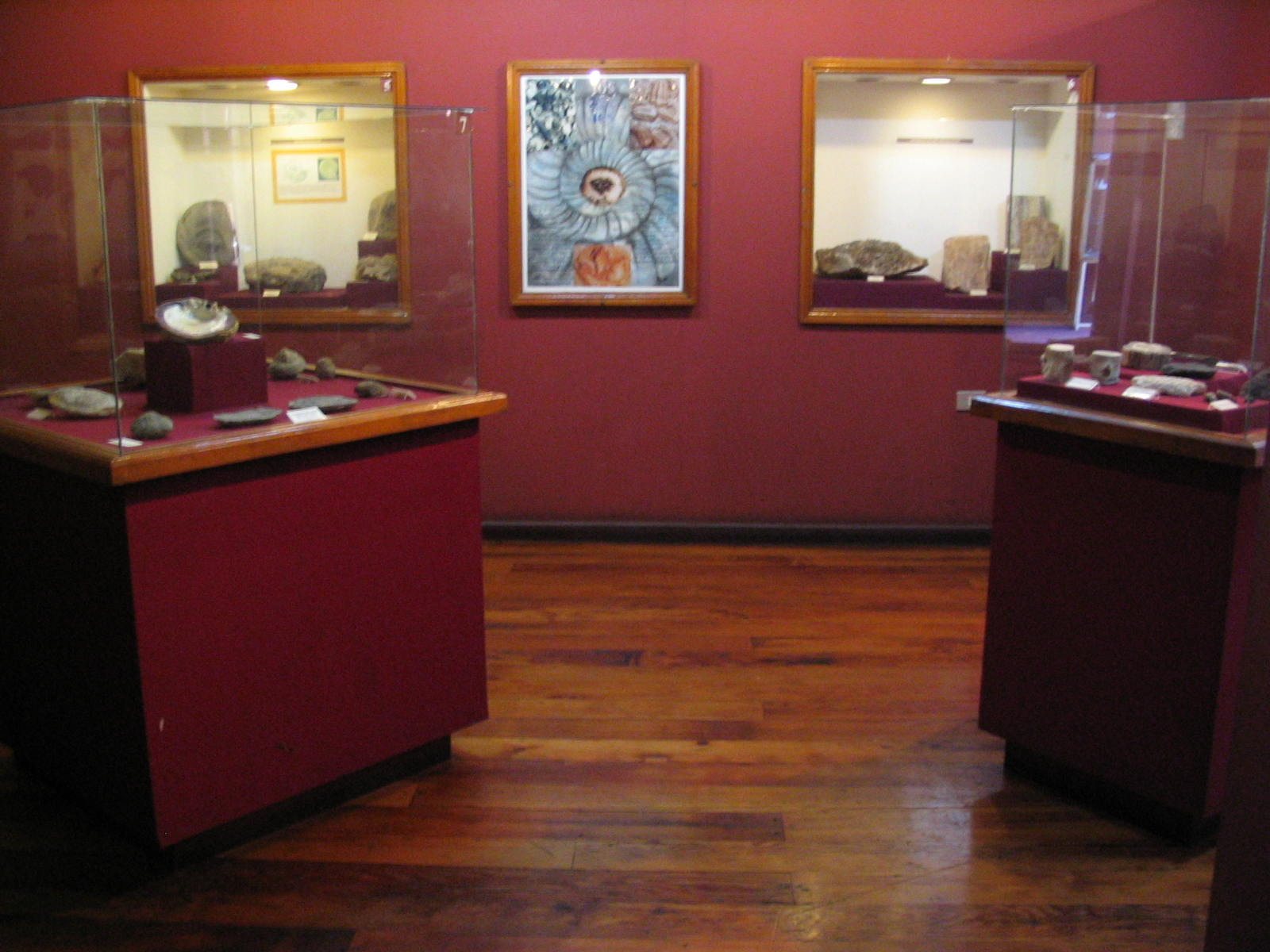 Sala de Geología de la exposición permanente del Museo Regional de Antofagasta, Chile.